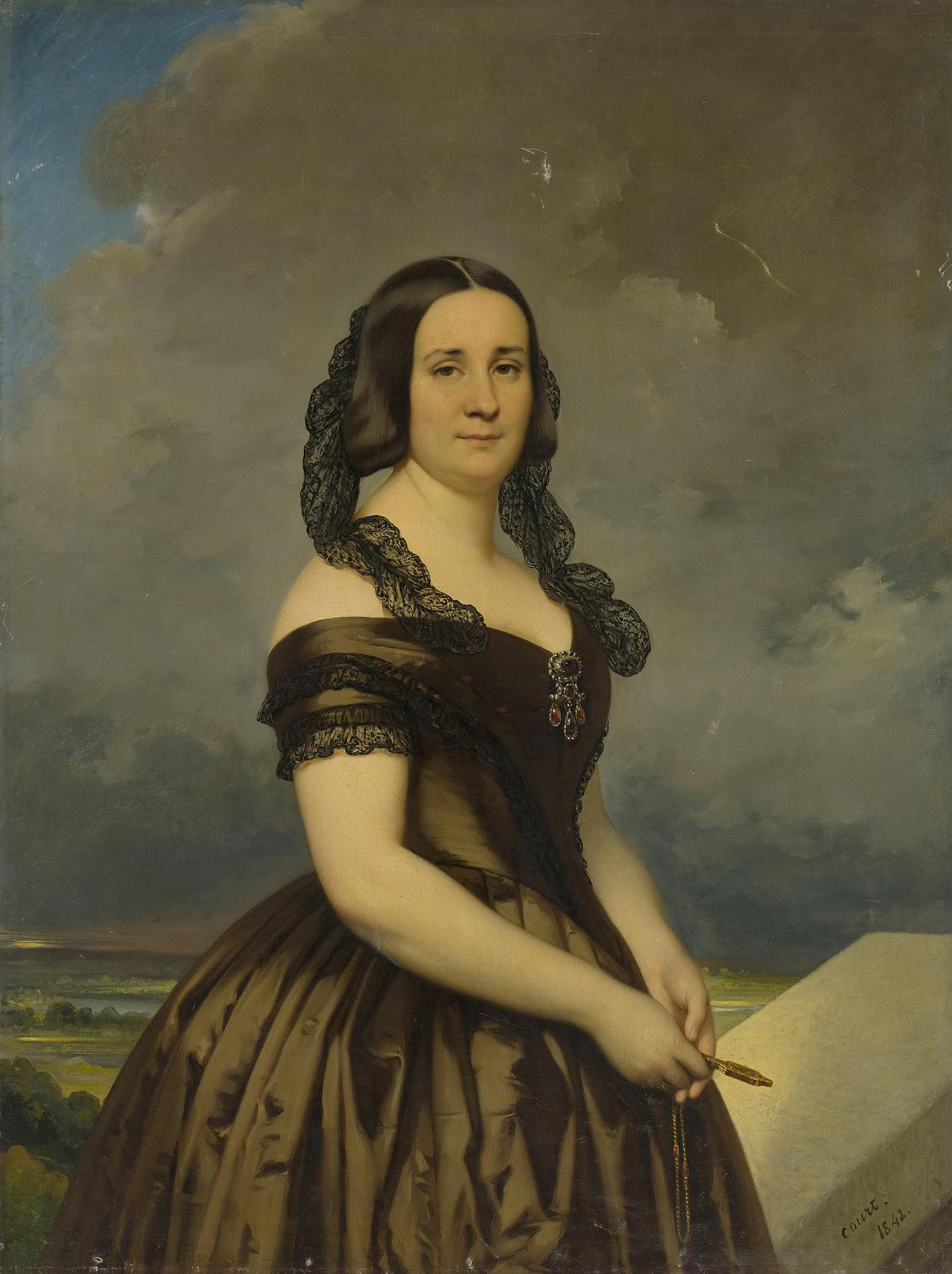 Александра Михайловна Каратыгина (1802—1880)